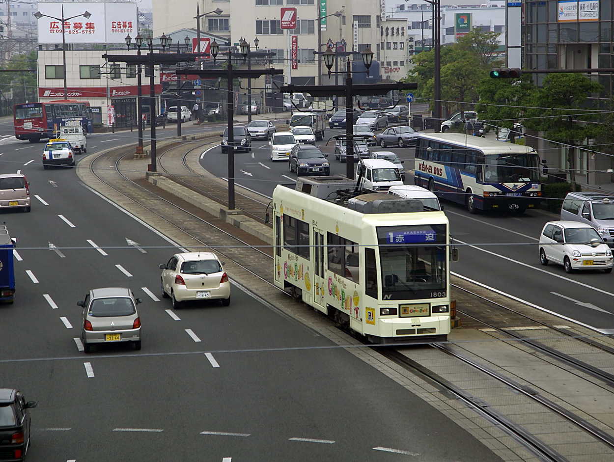 Streetcar of Nagasaki Electric Tramway, Nagasaki, Nagasaki, Japan